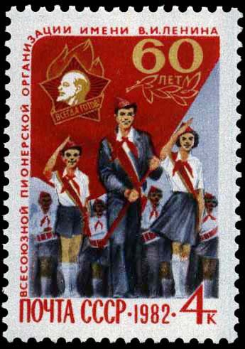 Пионерская дружина на торжественном марше. Знаменосец, почётный караул, барабанщики. Номер по каталогу ЦФА — 5291.